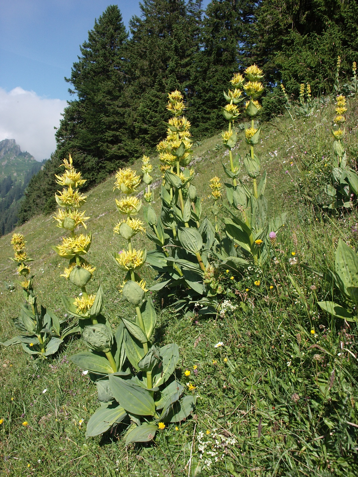 Gentiana lutea, Allgäuer Alpen, Germany